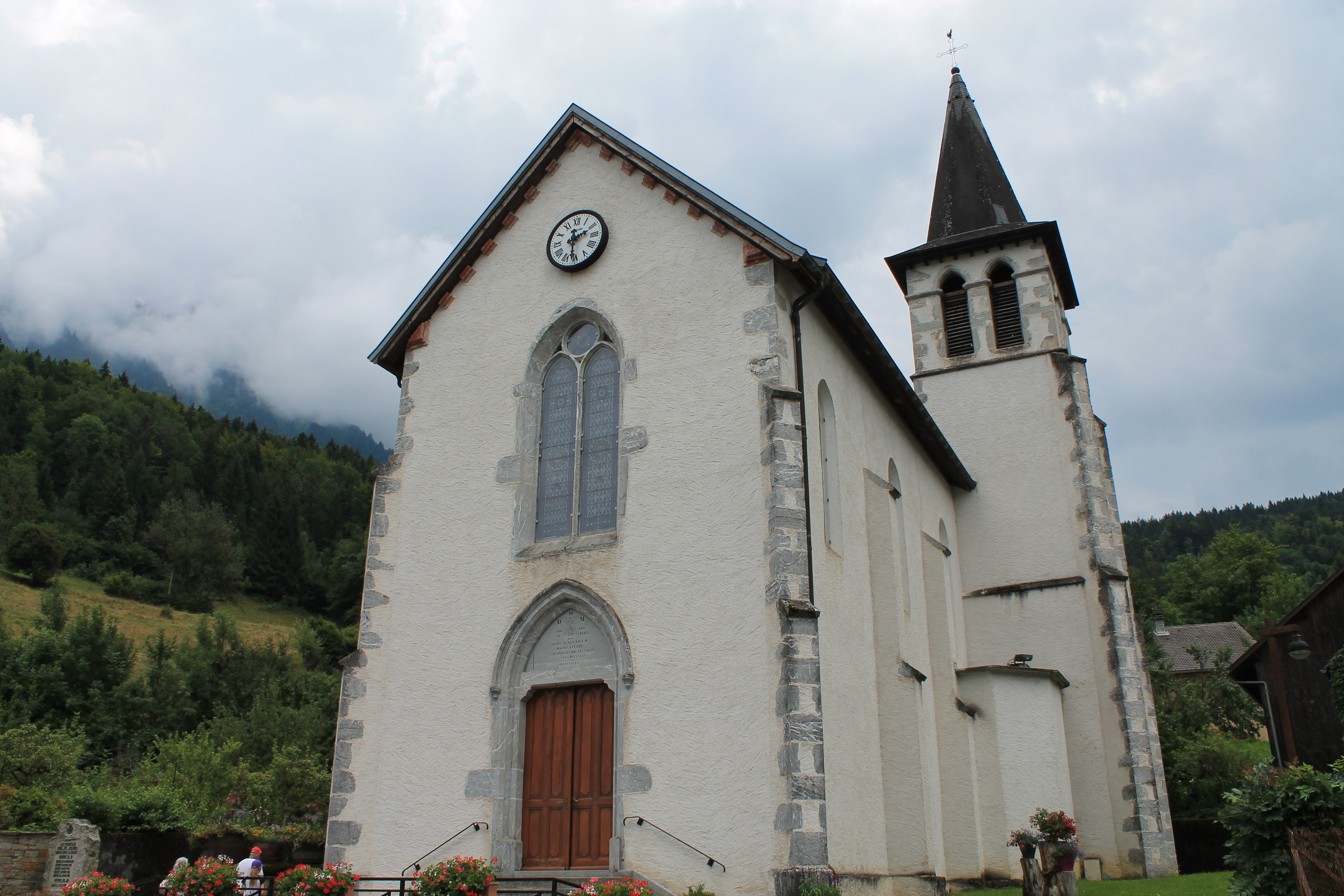 Façade et profil de l'église Sainte-Colombe